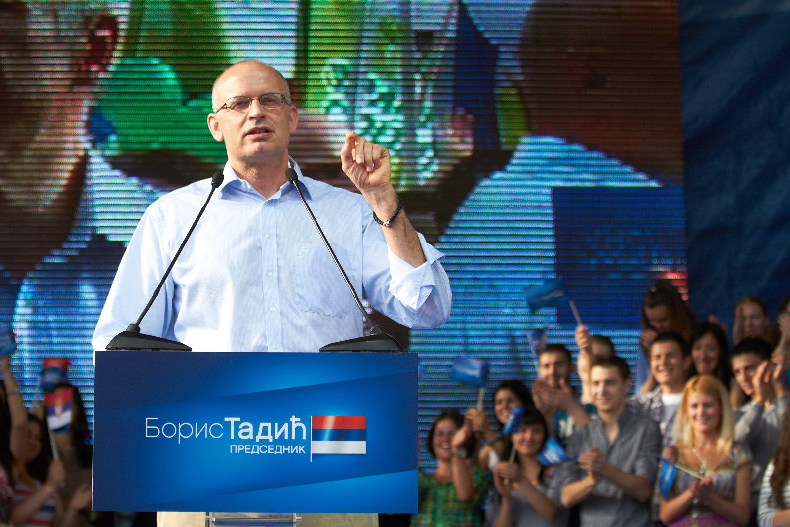 Miodrag Stojković na konvenciji u Leskovcu. (10. maj 2012); Foto servis DS